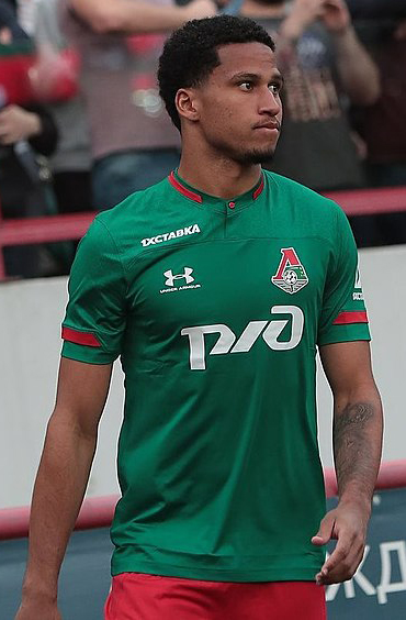 Мурило Серкейра в составе Локомотива на встрече с болельщиками. 09.07.2019